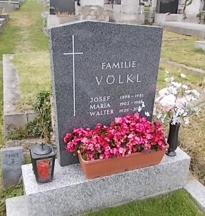 Walter Völkl - Ottakringer Friedhof (6A-3-13)